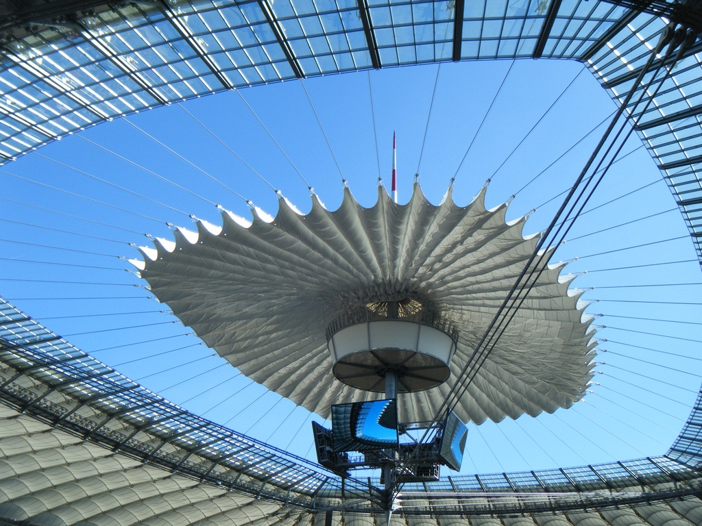 Dach Stadionu Narodowego w Warszawie - operacja zamknięcia dachu.